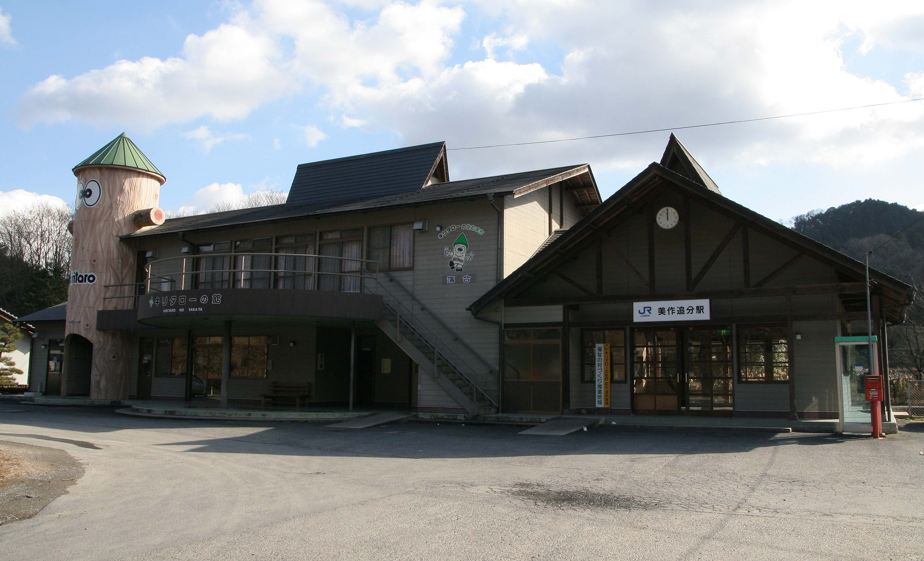 美作追分駅の駅舎